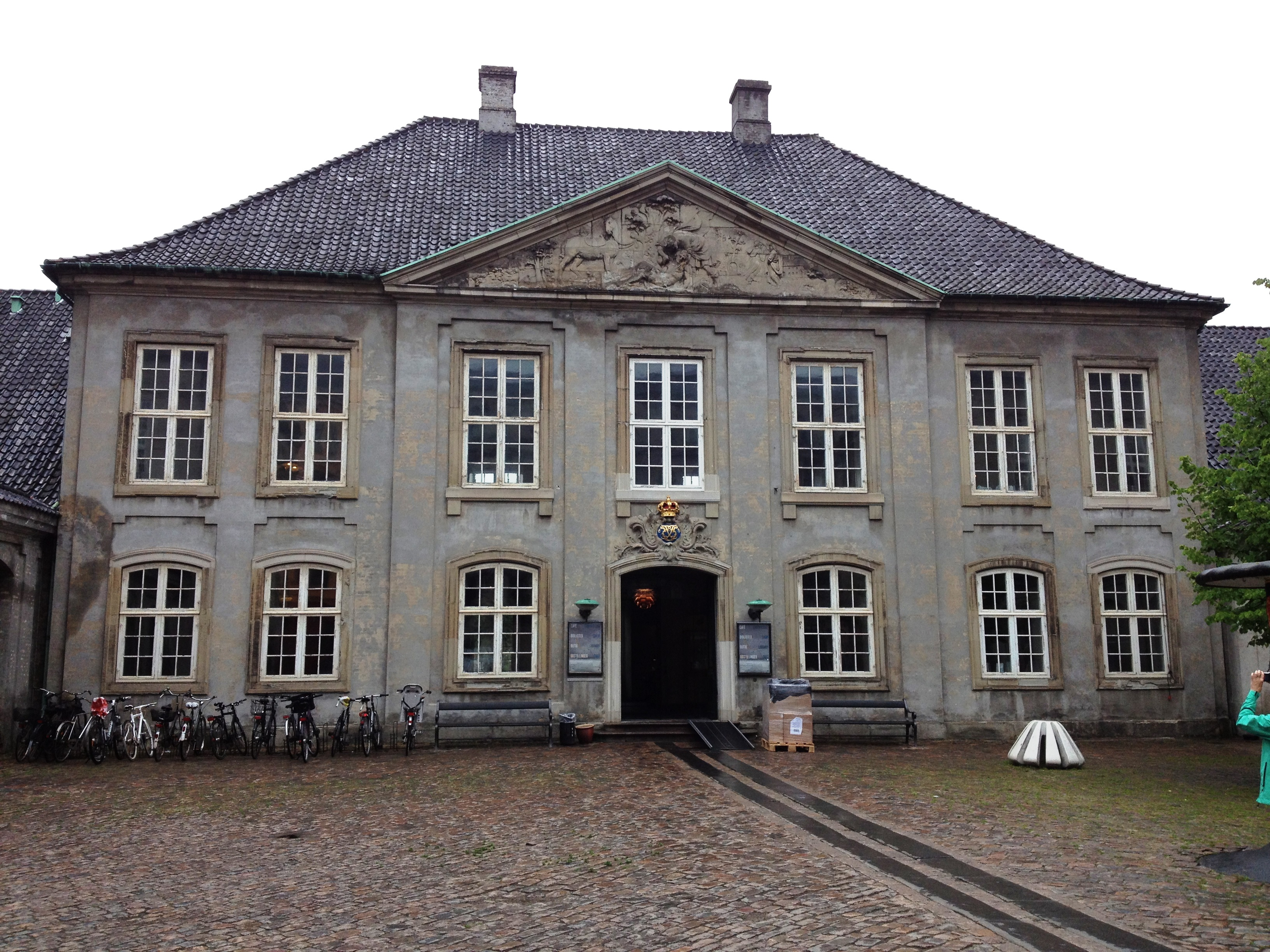 Designmuseum Danmark